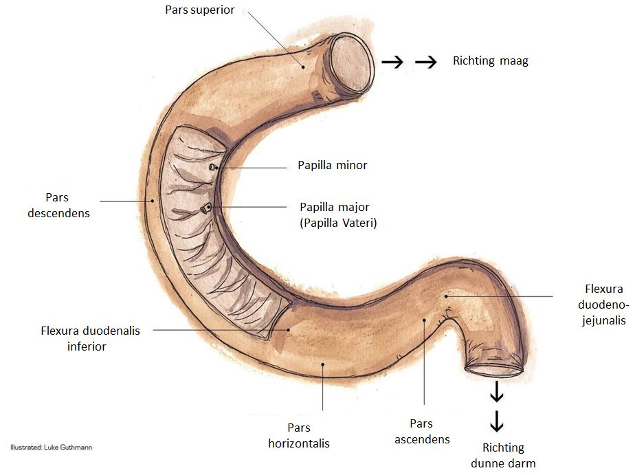 Anatomie van de twaalfvingerige darm